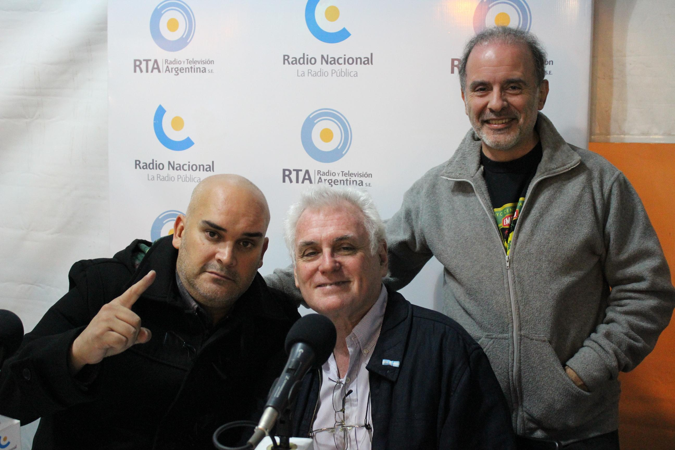 Néstor Restivo con el Sr. Magallanes y Carlos Ulanovsky, en Radio Nacional Argentina (Buenos Aires), 25 de mayo de 2015.